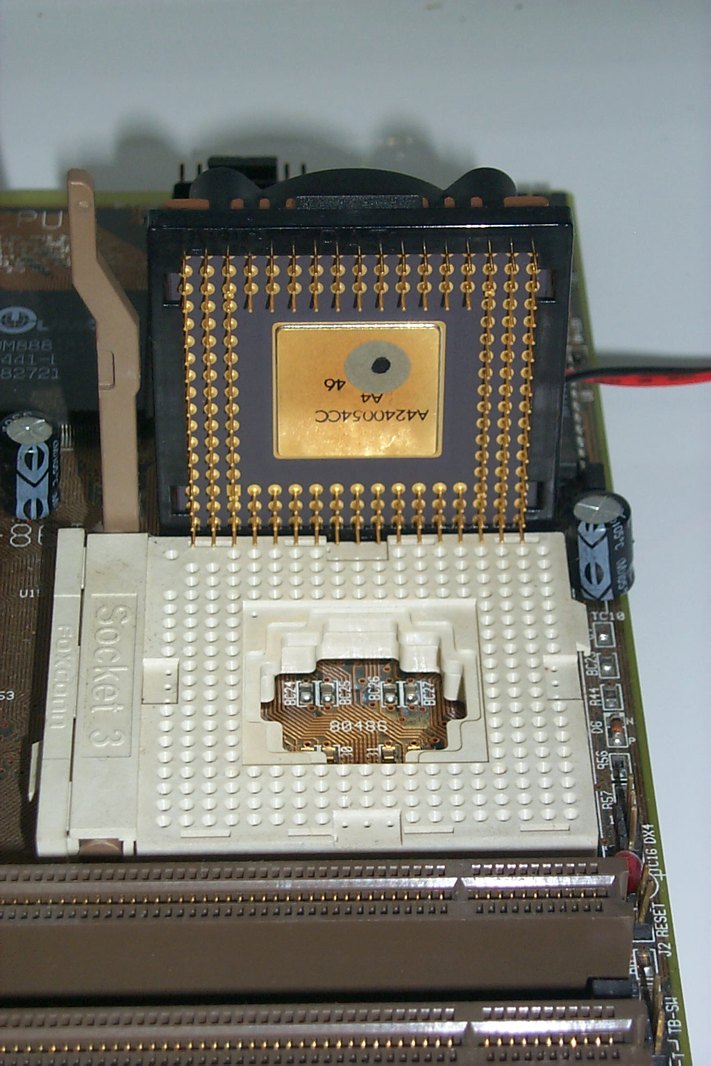 Intel 80486DX4 (100 MHz) and Socket 3